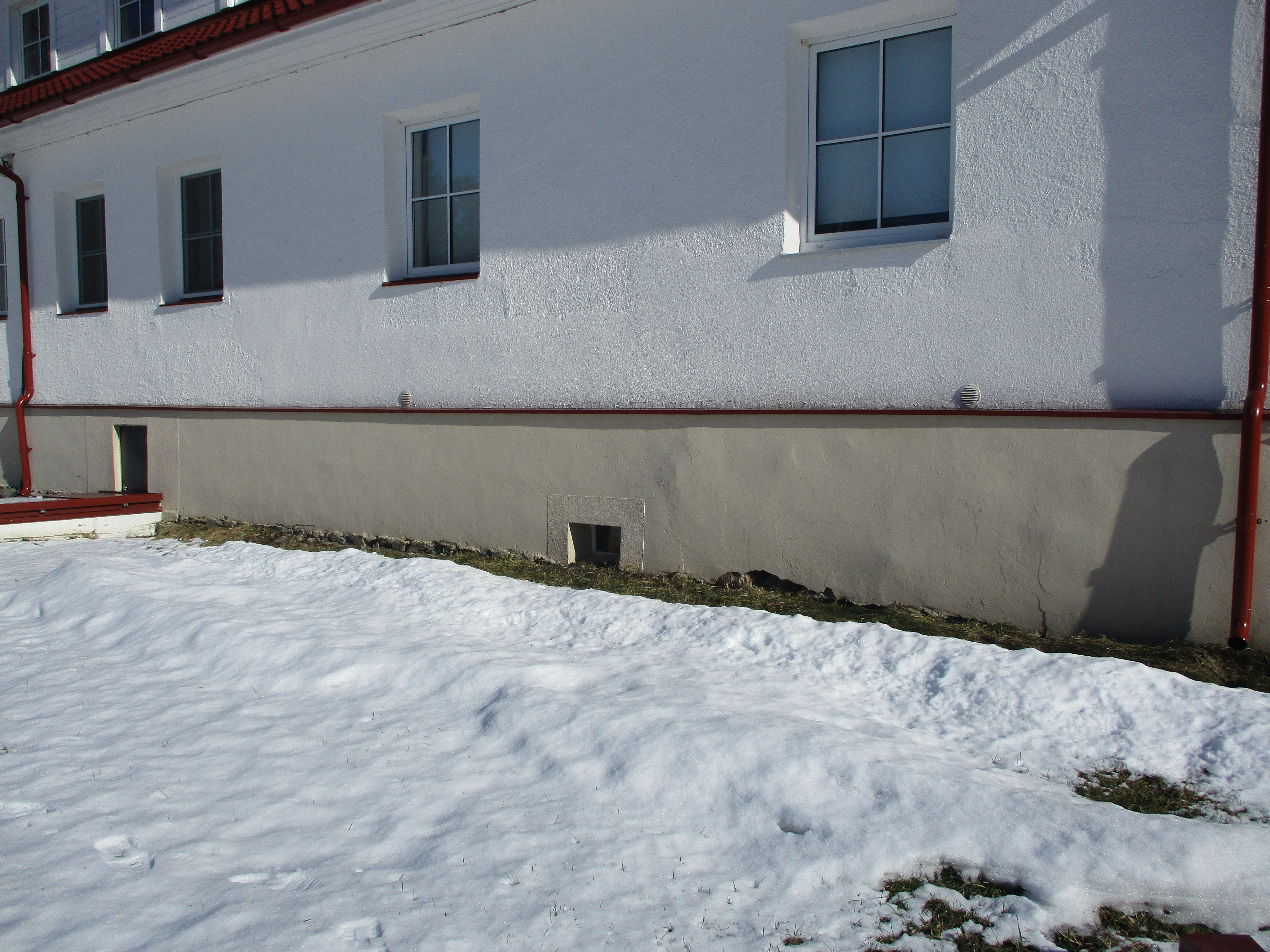 Peahoone läänekülg, soklikorrus koos väikese keldriaknaga ulatub ilmselt tagasi hoone kõige varasemasse ehitusaega.